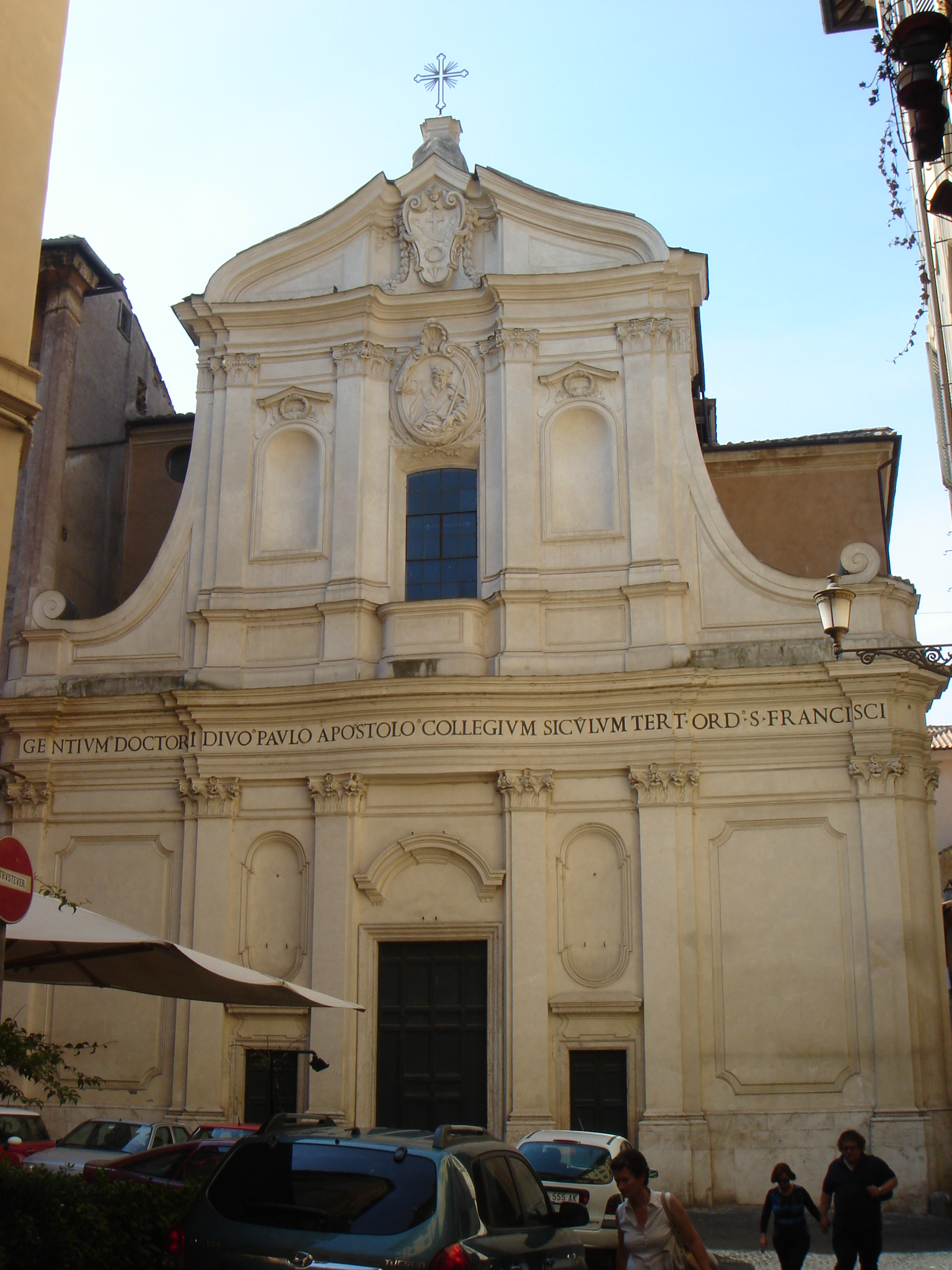 Roma, San Paolino alla Regola